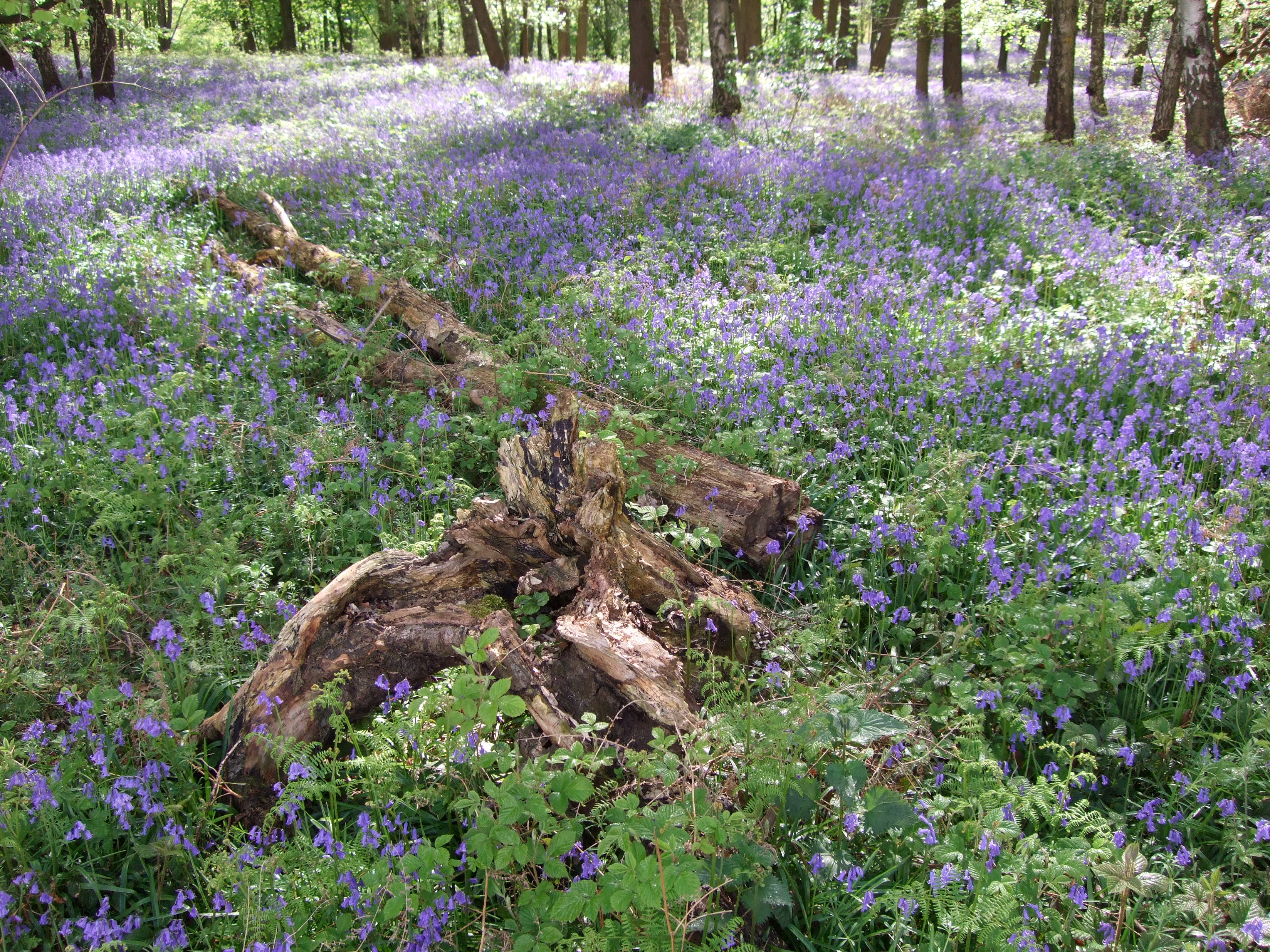 The Bluebells Wood half-way between Doveren and Baal in Germany. / Der sogenannte Wald der blauen Blumen zwischen Doveren und Baal in Deutschland.